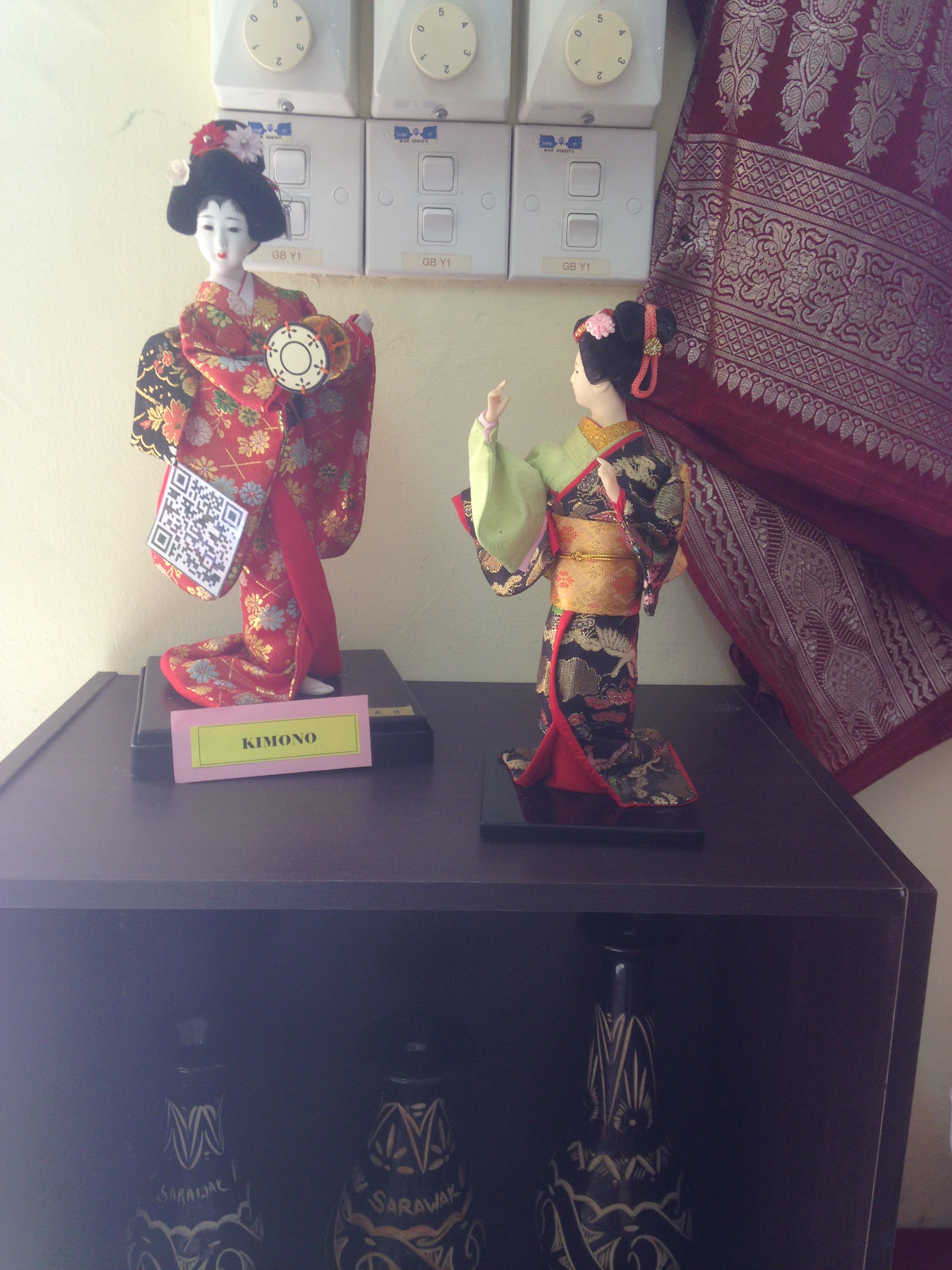 KIMONO